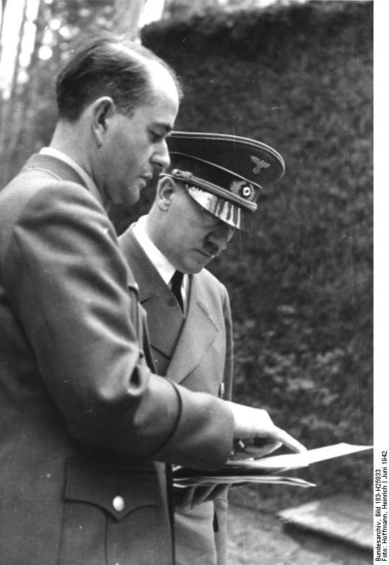 Speer erstattet dem Führer im Hauptquartier Bericht, [herausgegeben] Juni 1942 ADN-ZB/Archiv Der Reichsminister für Bewaffnung und Munition Albert Speer bei einer Unterredung im Führerhauptquartier mit Adolf Hitler. 2938-43